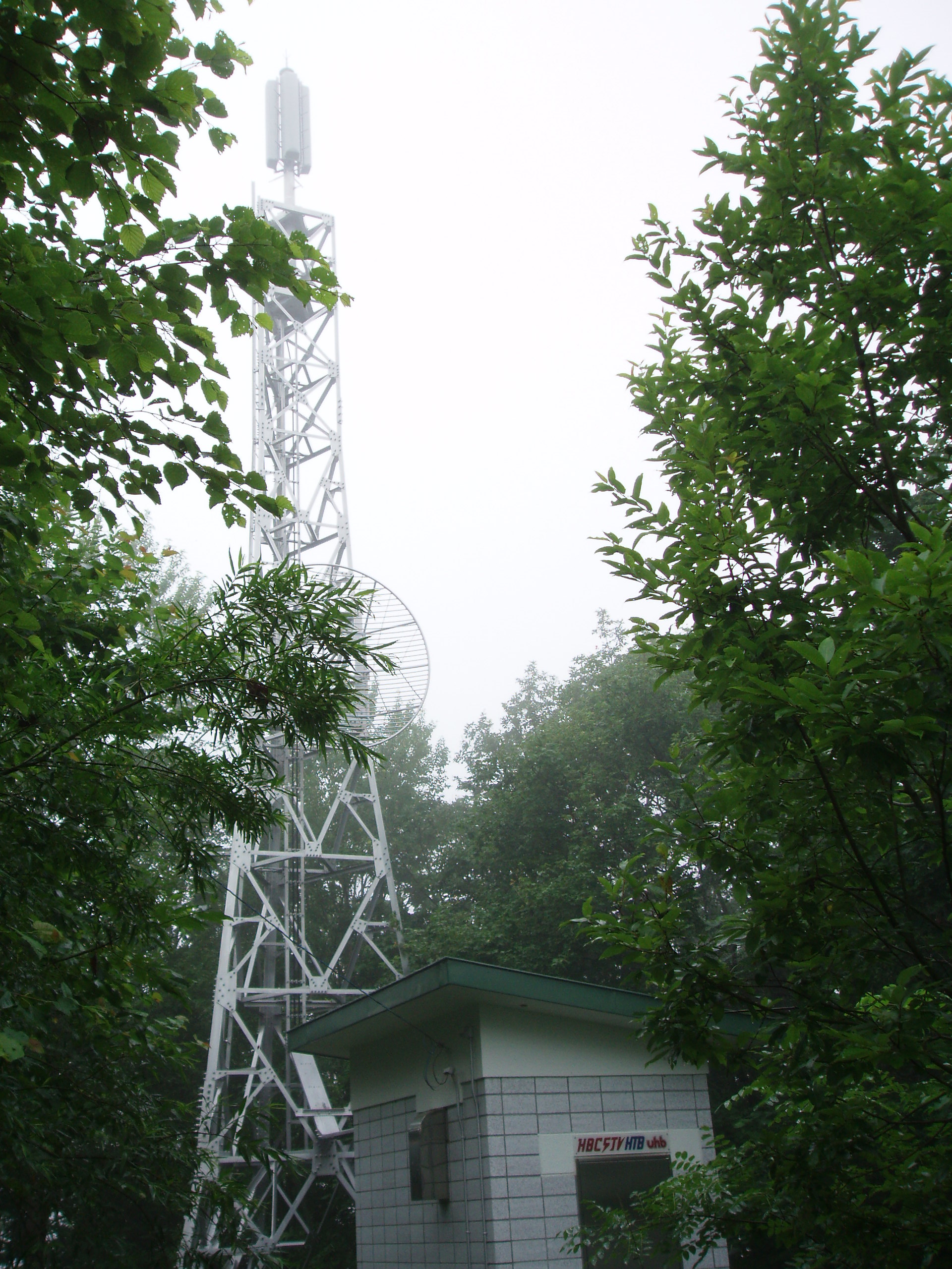 佐呂間中継局 HBC・STV・HTB・UHB送信設備